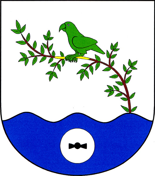 Znak obce Polepy (okres Kolín)